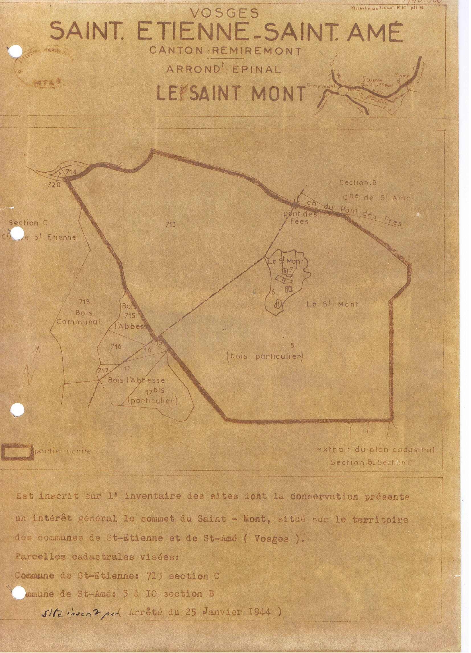 Le site archéologique, situé sur le sommet du Saint-Mont à cheval sur les communes de Saint–Étienne-lès-Remiremont et Saint-Amé. Site inscrit sur l’inventaire des sites par arrêté du 25 janvier 1944, puis sur l’inventaire supplémentaire des monuments historiques par arrêté du 7 juillet 1995).